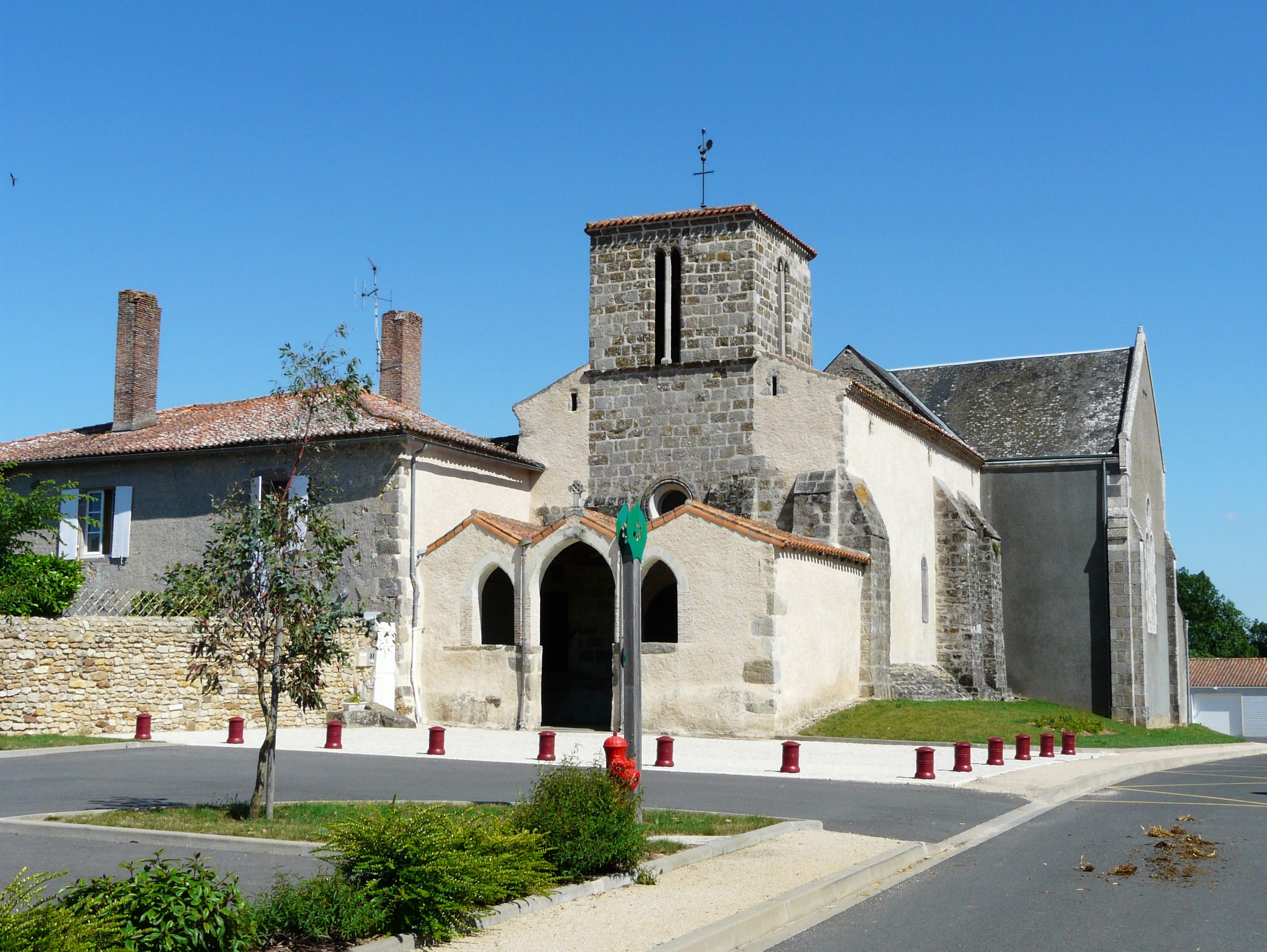 L'église Saint-Jean Baptiste, Lhoumois, Deux-Sèvres, France